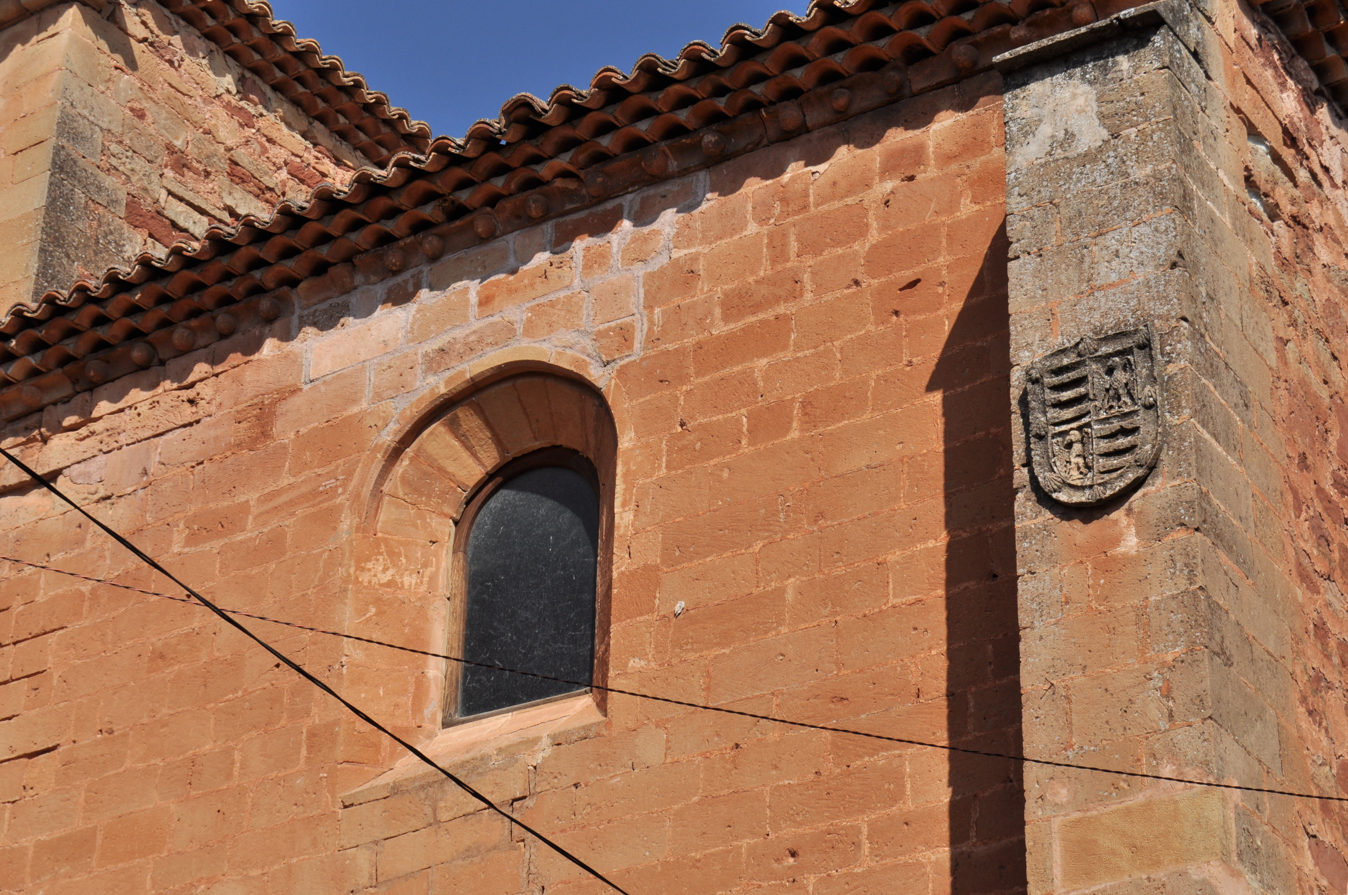 Alcaraz - 033